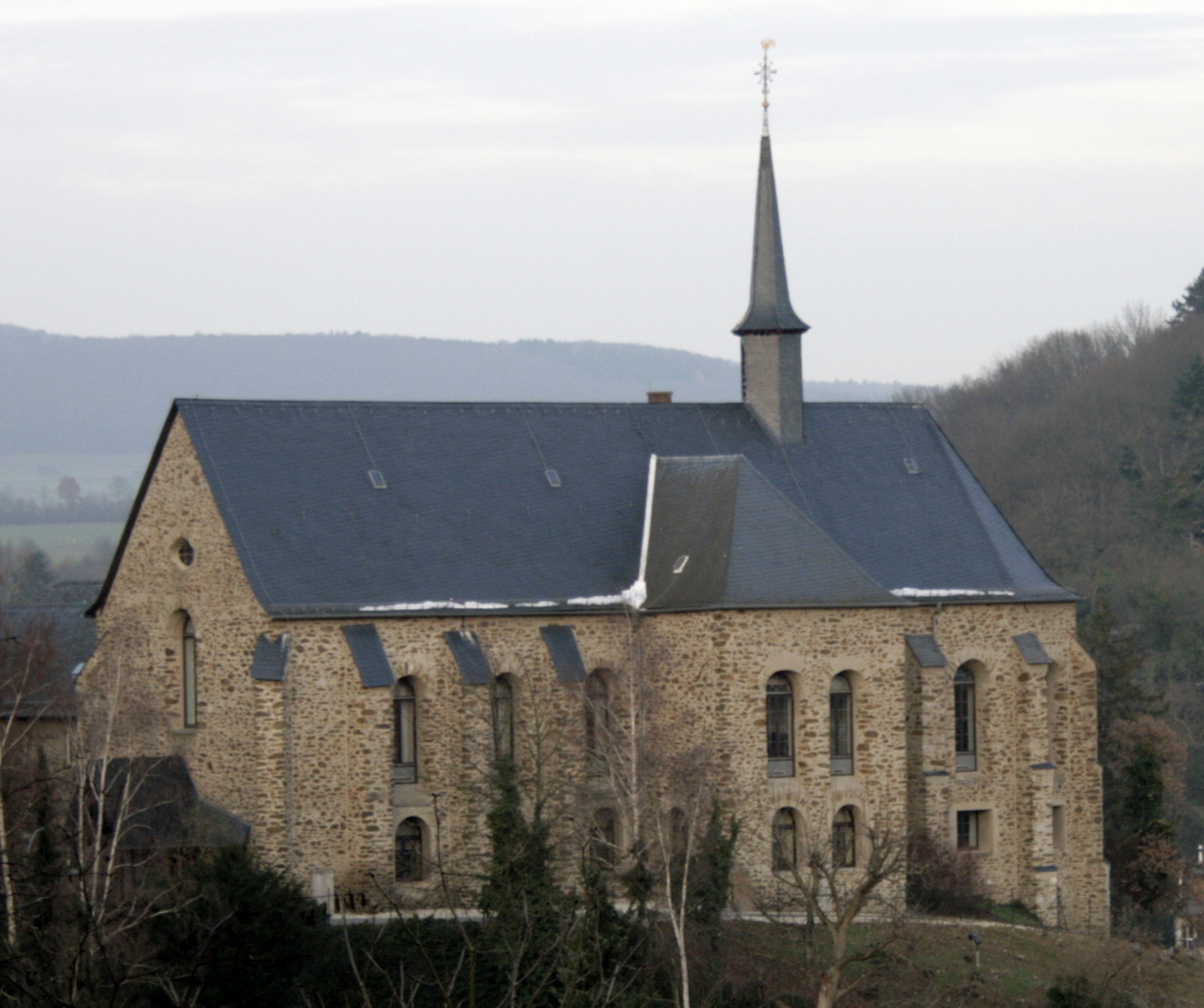 Ägidiuskirche in Hadamar, Deutschland